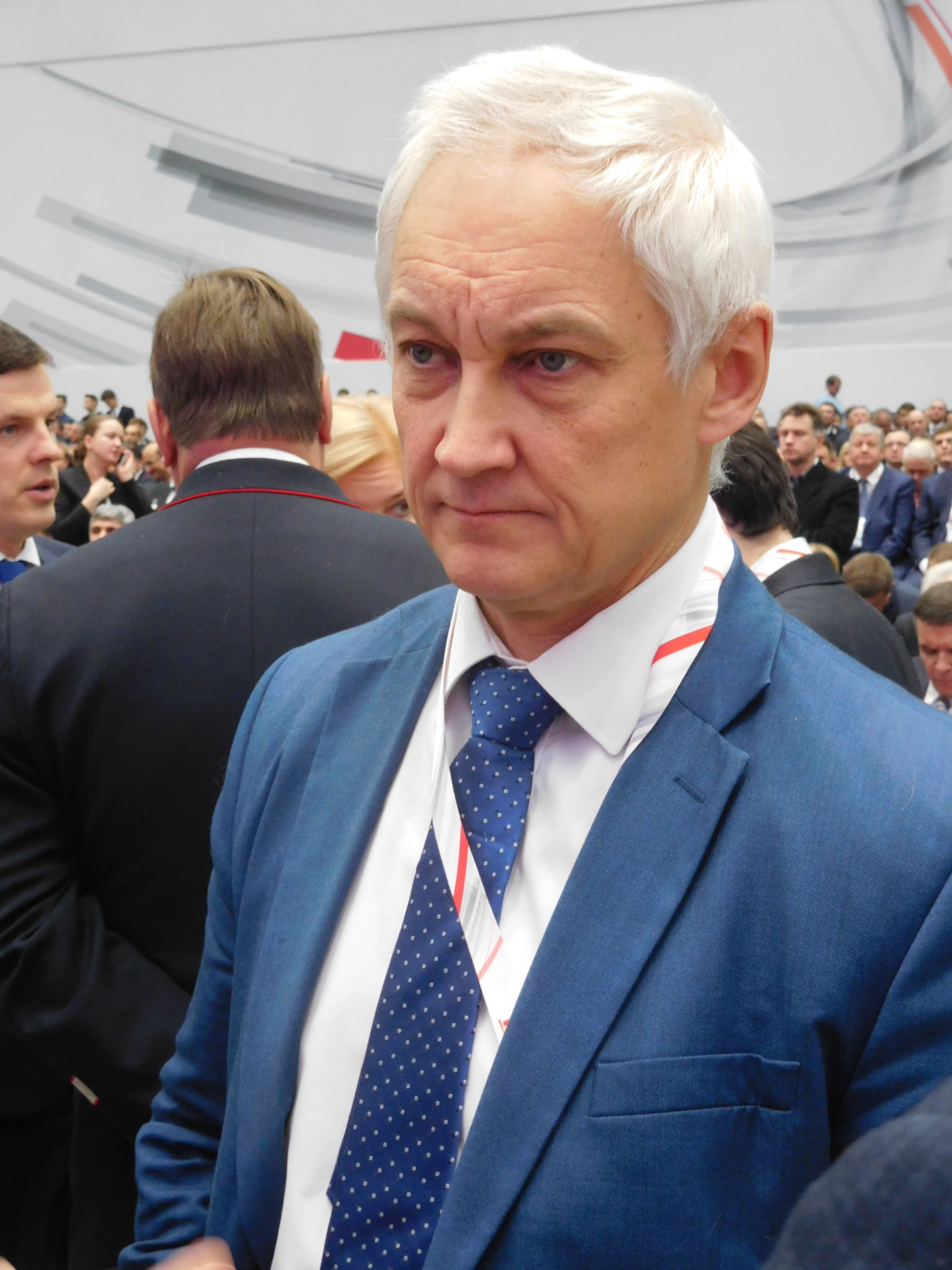 Андрей Белоусов на Съезде железнодорожников